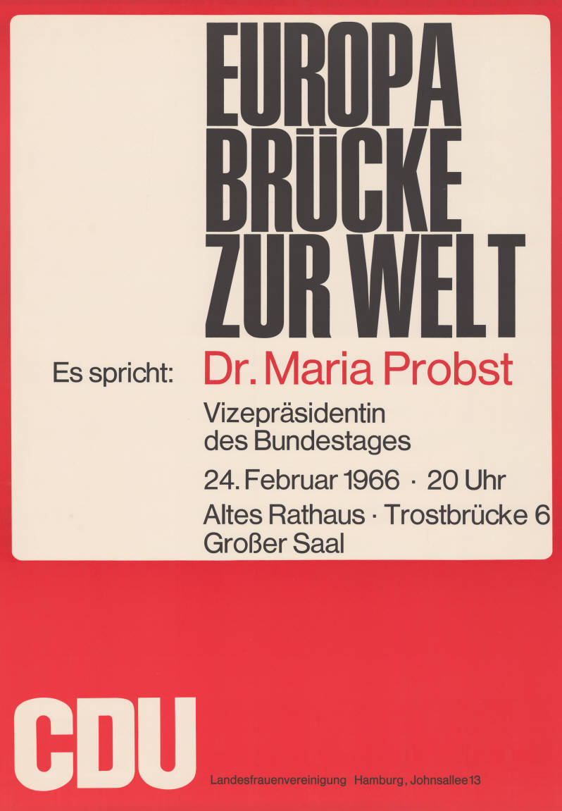 Europa Brücke Zur Welt Es spricht: Dr. Maria Probst Vizepräsidentin des Bundestages ... Plakatart: Ankündigungsplakat Auftraggeber: CDU Landesfrauenvereinigung Hamburg Objekt-Signatur: 10-006 : 258 Bestand: Plakate zu Bürgerschaftswahlen Hamburg (10-006) GliederungBestand10-18: Plakate zu Bürgerschaftswahlen Hamburg (10-006) » CDU Lizenz: KAS/ACDP 10-006 : 258 CC-BY-SA 3.0 DE